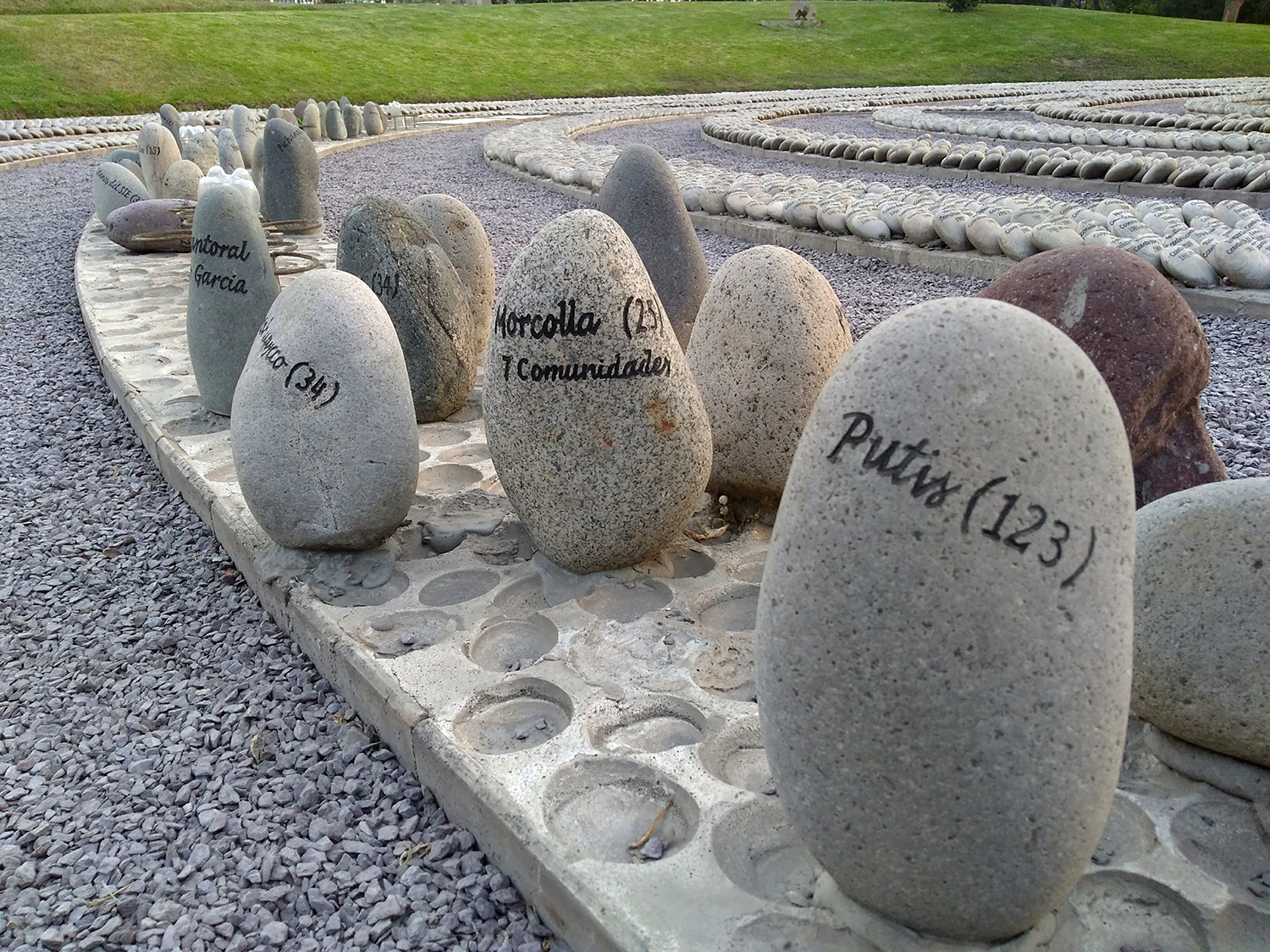 Memorial El ojo que llora, obra de la escultora holandesa radicada en el Perú Lika Mutal, realizado en homenaje a las victimas del conflicto armado interno en el Perú. Este monumento fue declarado patrimonio cultural de la nación por el Ministerio de Cultura del Perú en el año 2013.